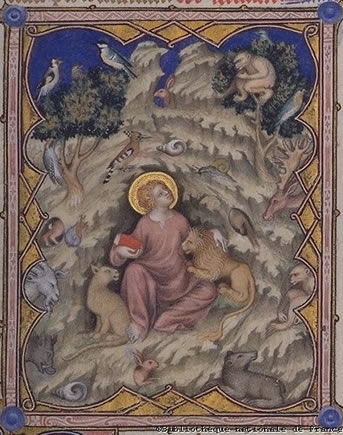 John Baptist in desert